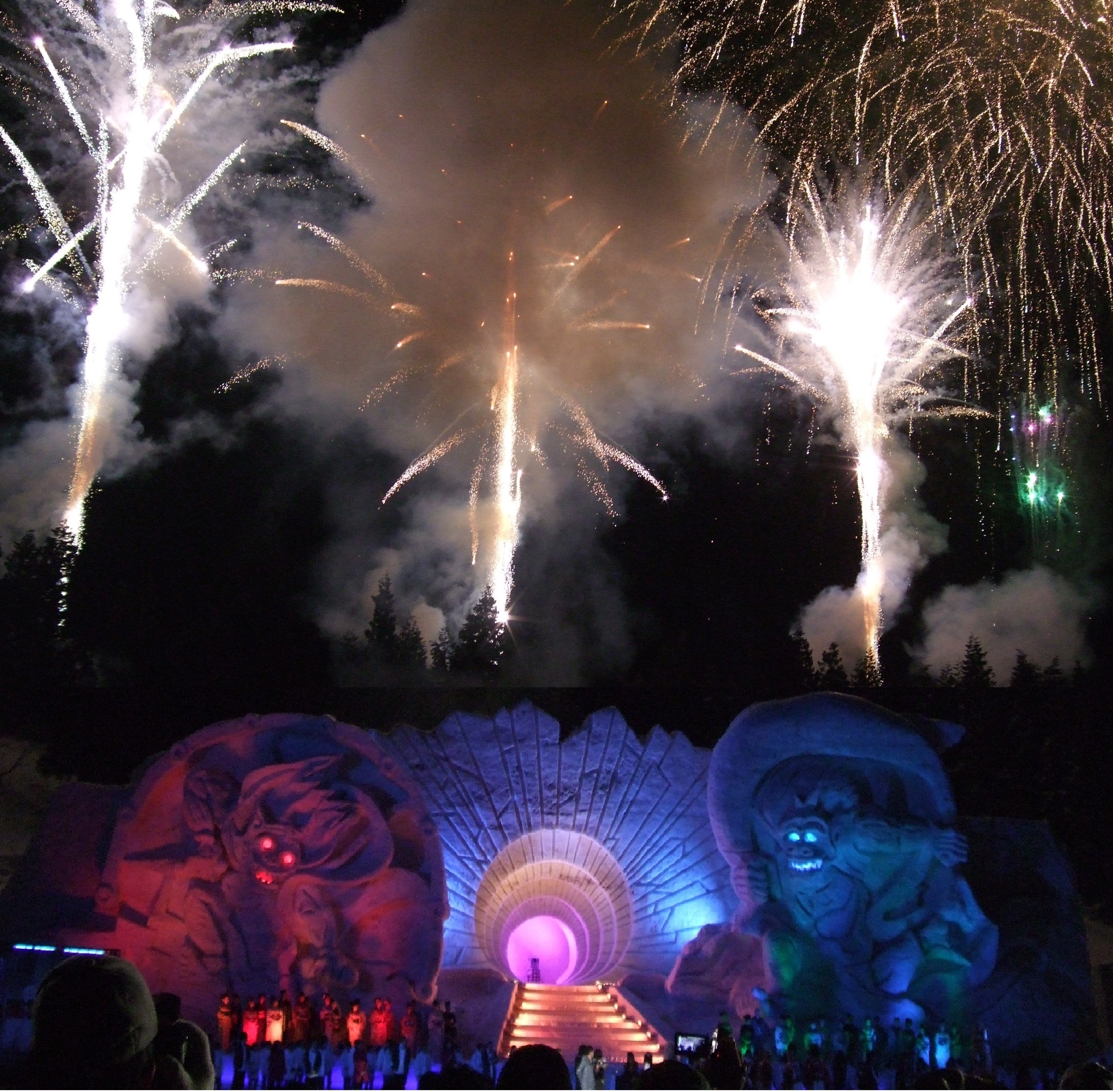 Tokamachi city,Niigata,Japan